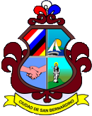 Escudo de San Bernardino, Paraguay.